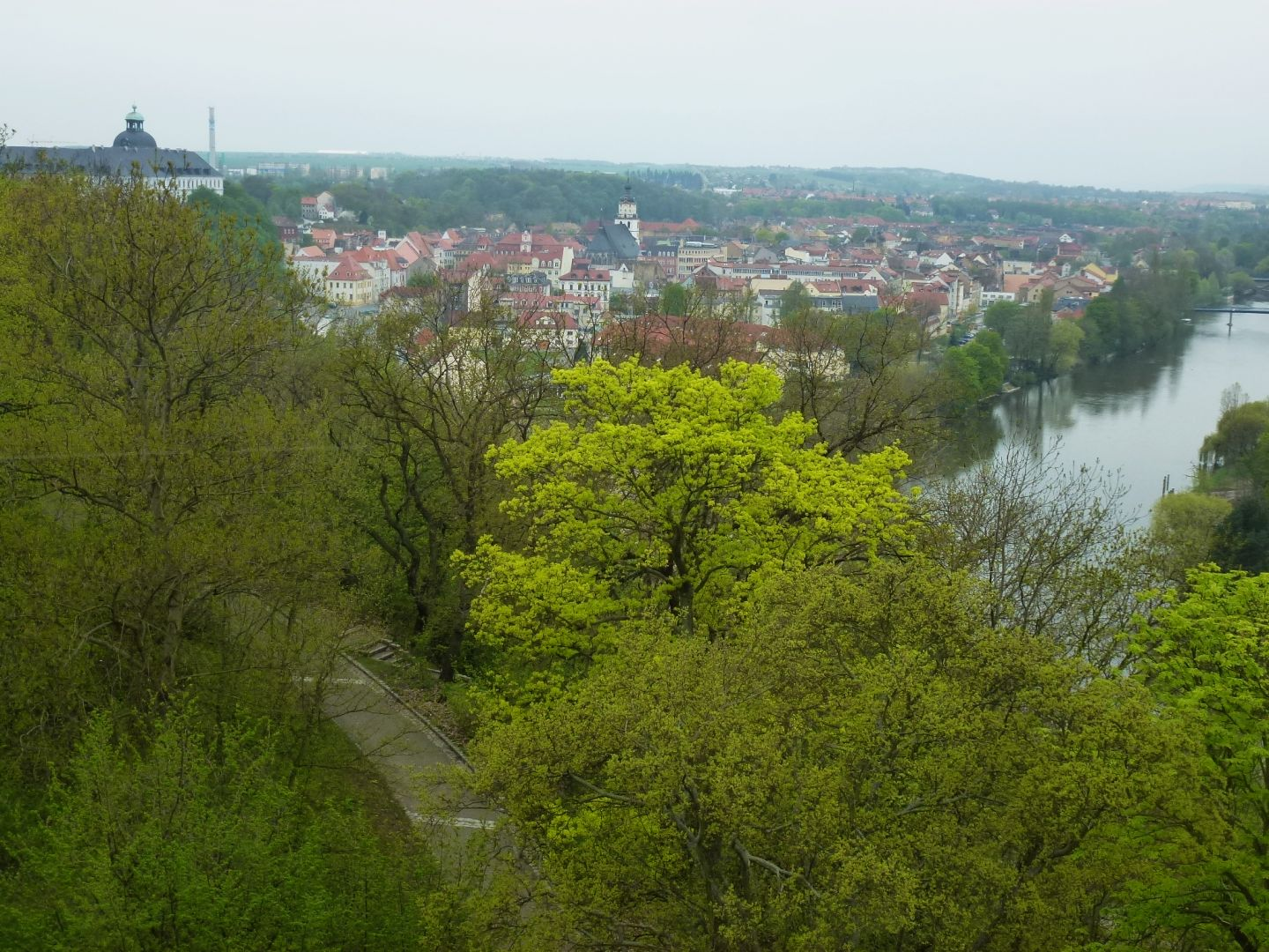 Blick auf Weißenfels vom Bismarckturm